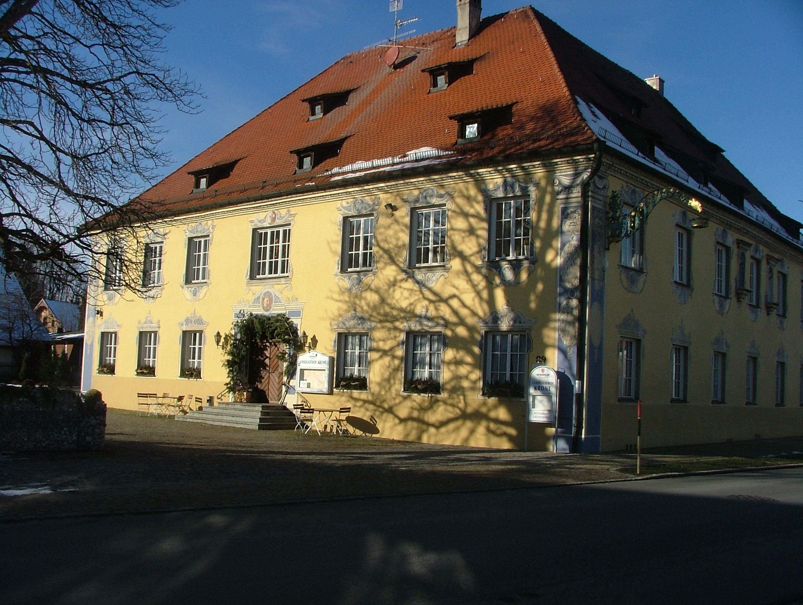 Gasthaus Krone Berkheim